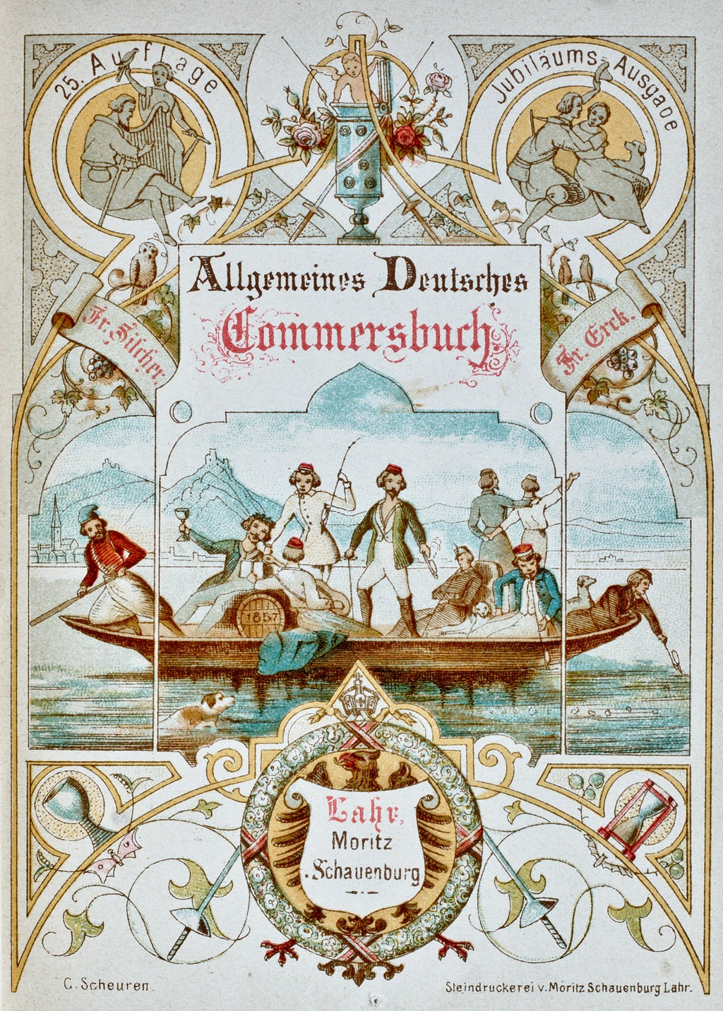 Titelbild des Allgemeinen Deutschen Commersbuches 25. Auflage 1. Abdruck (1882)